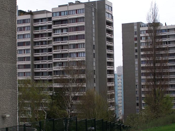 Les tours de la rue de la Capsulerie - Bagnolet - Seine St Denis 2006 Je suis l'auteur de cette photo